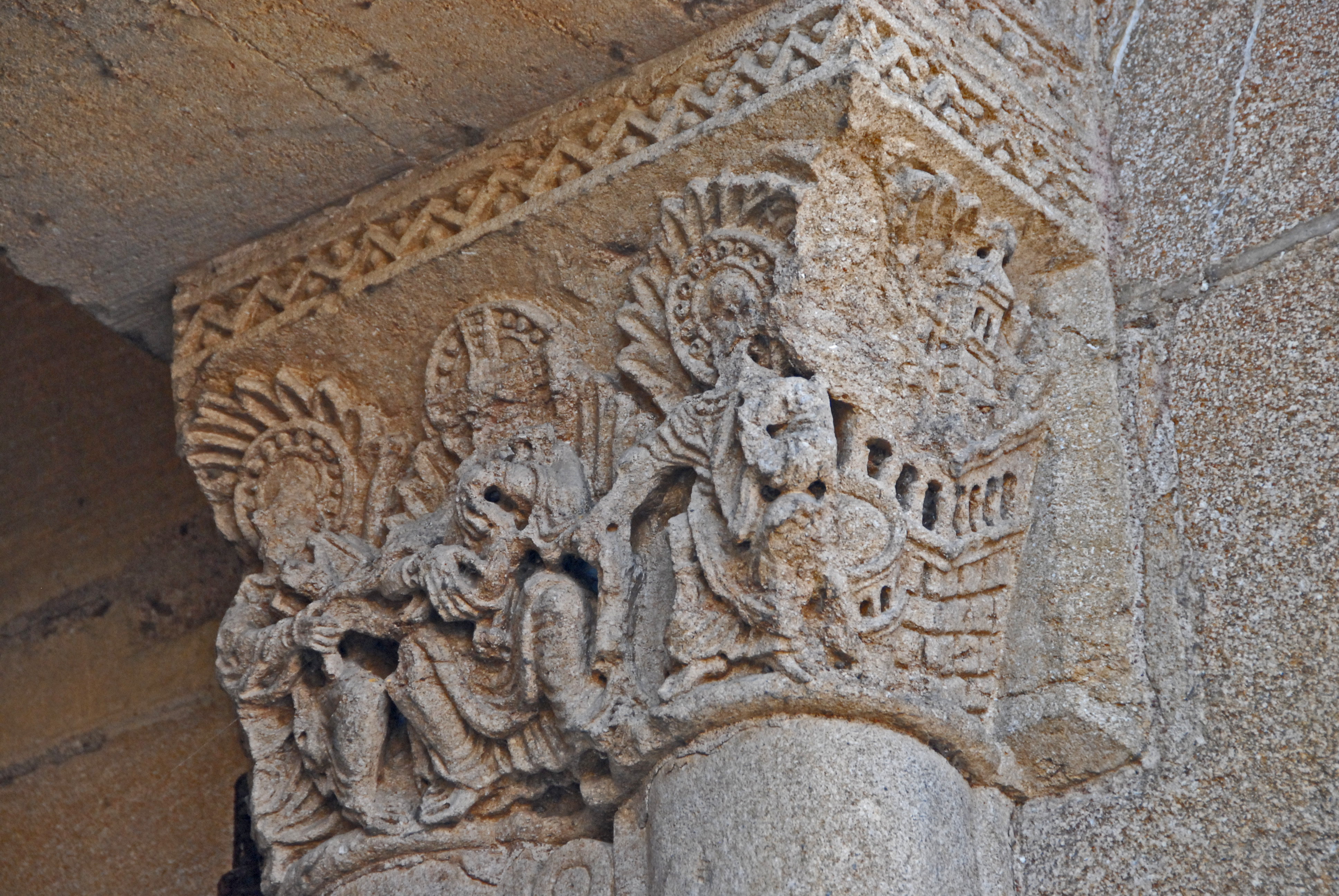 Kleines Nordportal, Kapitell rechts